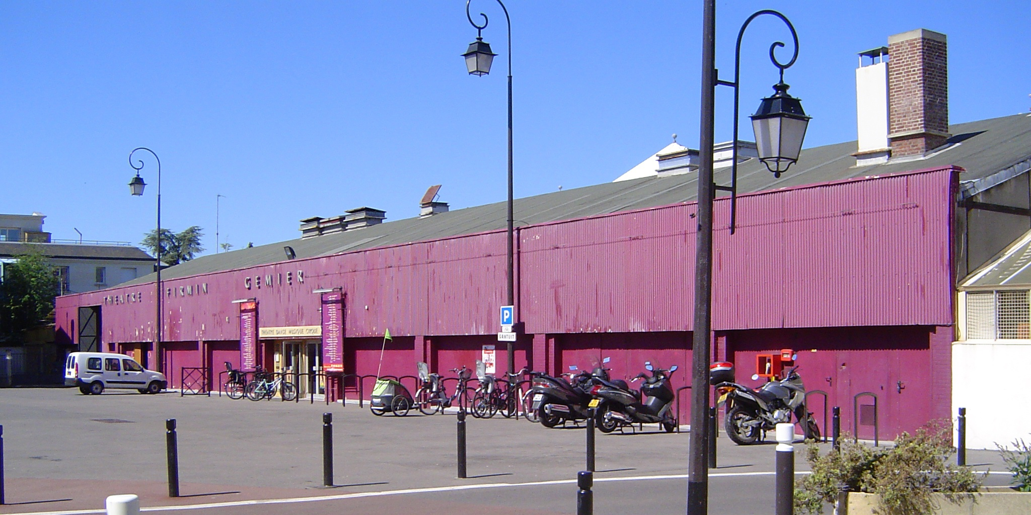 Photos prises à Antony